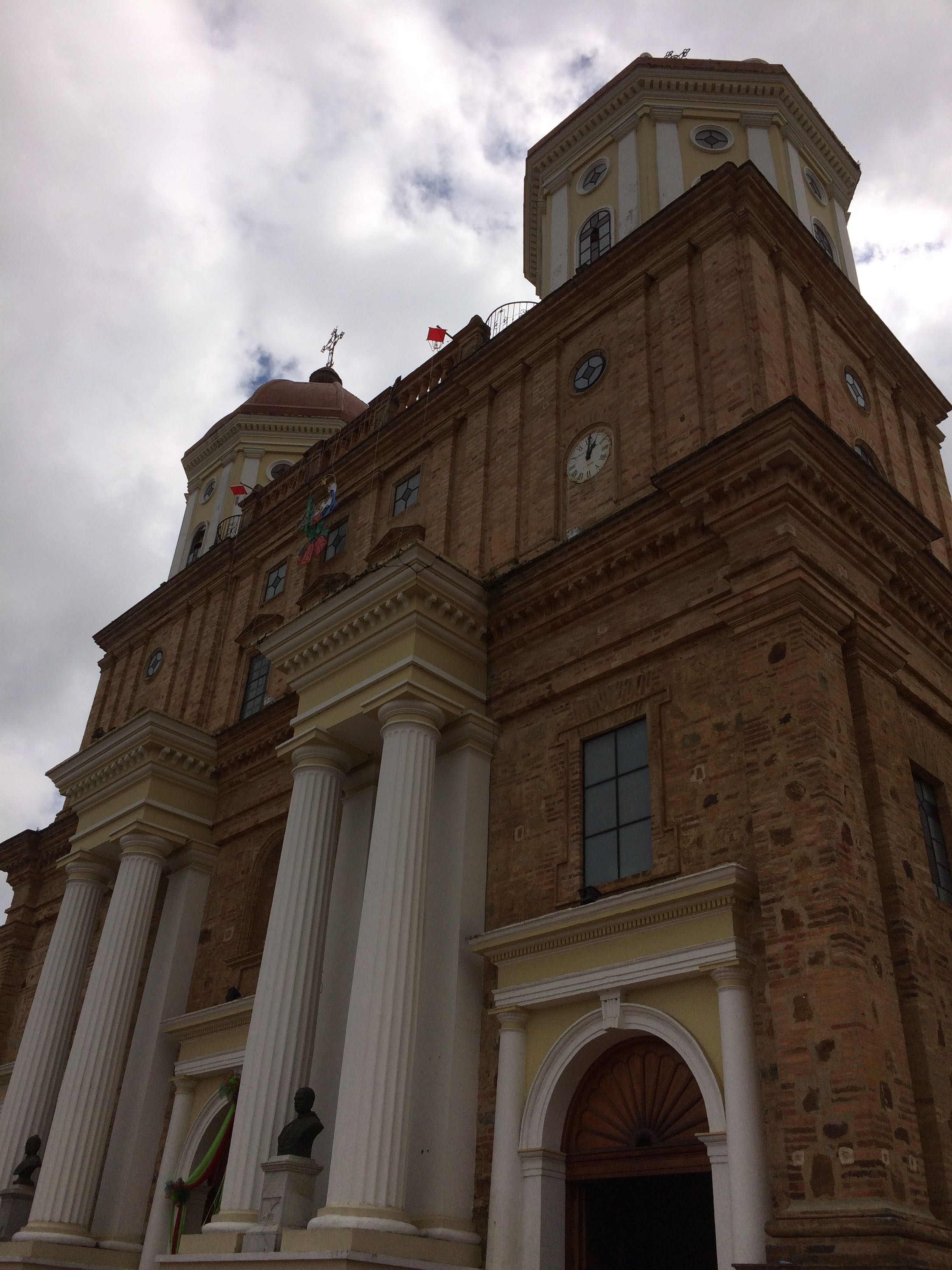 SANTA ROSA DE OSOS ANTIOQUIA Esta fotografía fue tomada en el municipio colombiano con código 05686.